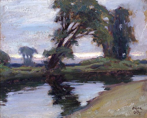 Paysage de la rivière Nicolet, Arthabaska